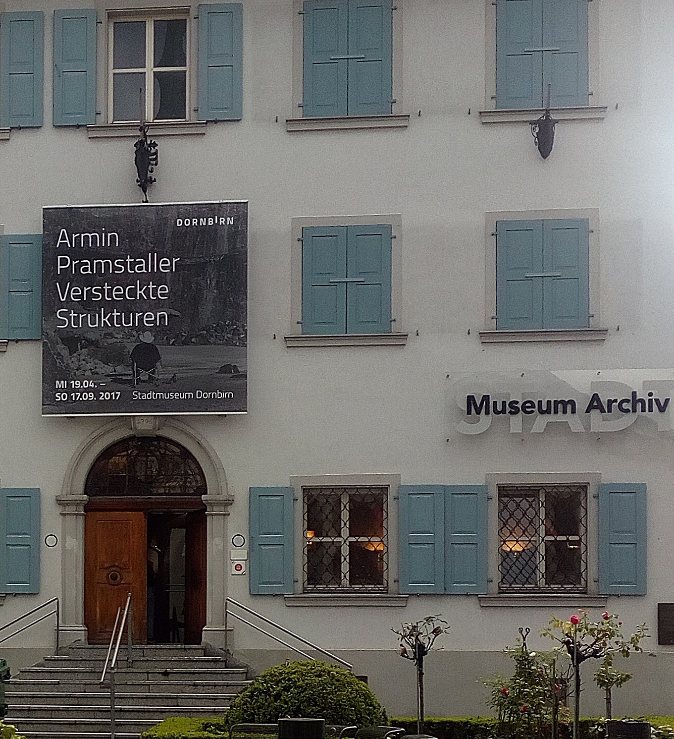 Ausstellung Dornbirn